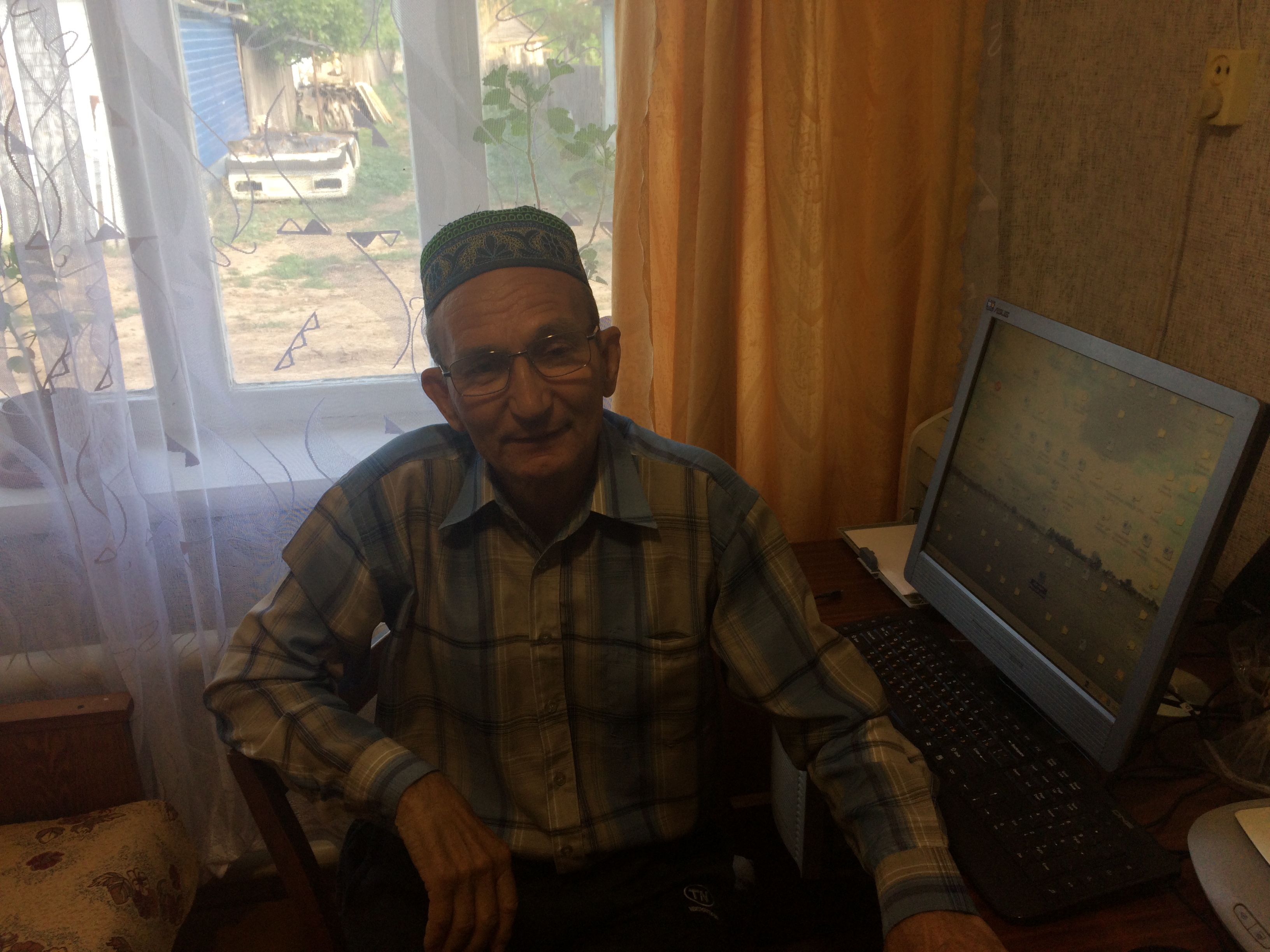 Астраханский историк-краевед Шамиль Курбангалиевич Сиражетдинов